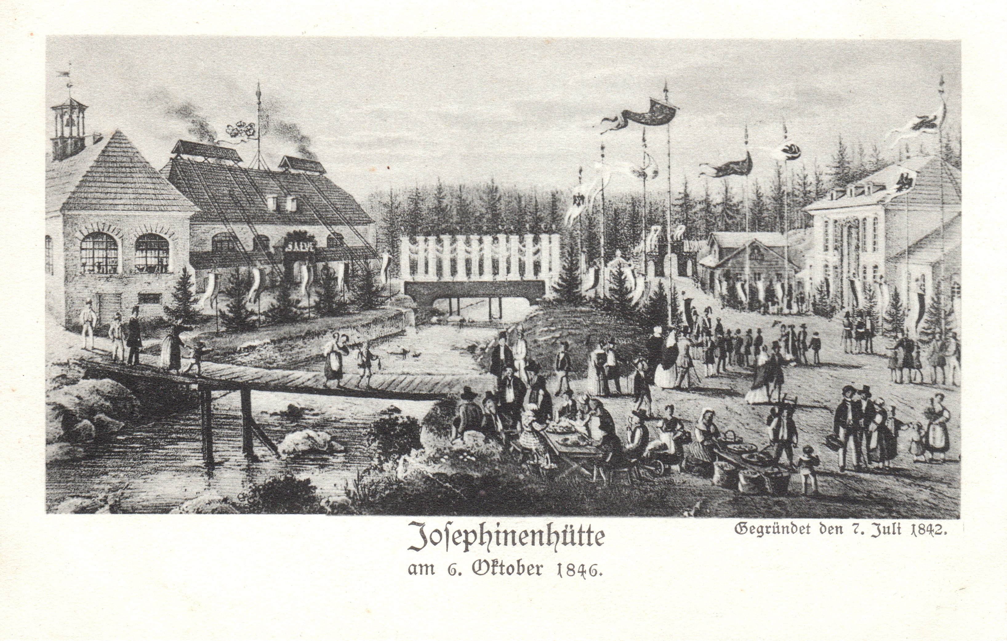 Eintrittskarte von 1928 zur Besichtigung der Glashütte Josephinenhütte (heute in Szklarska Poręba), gegründet den 7. Juli 1842. Bild der Anlage vom 6. Oktober 1846